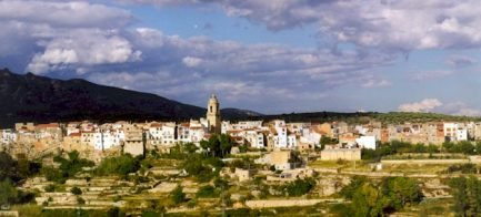 Municipi La Sénia (Montsià)